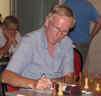 Börje Jansson under en av sina matcher